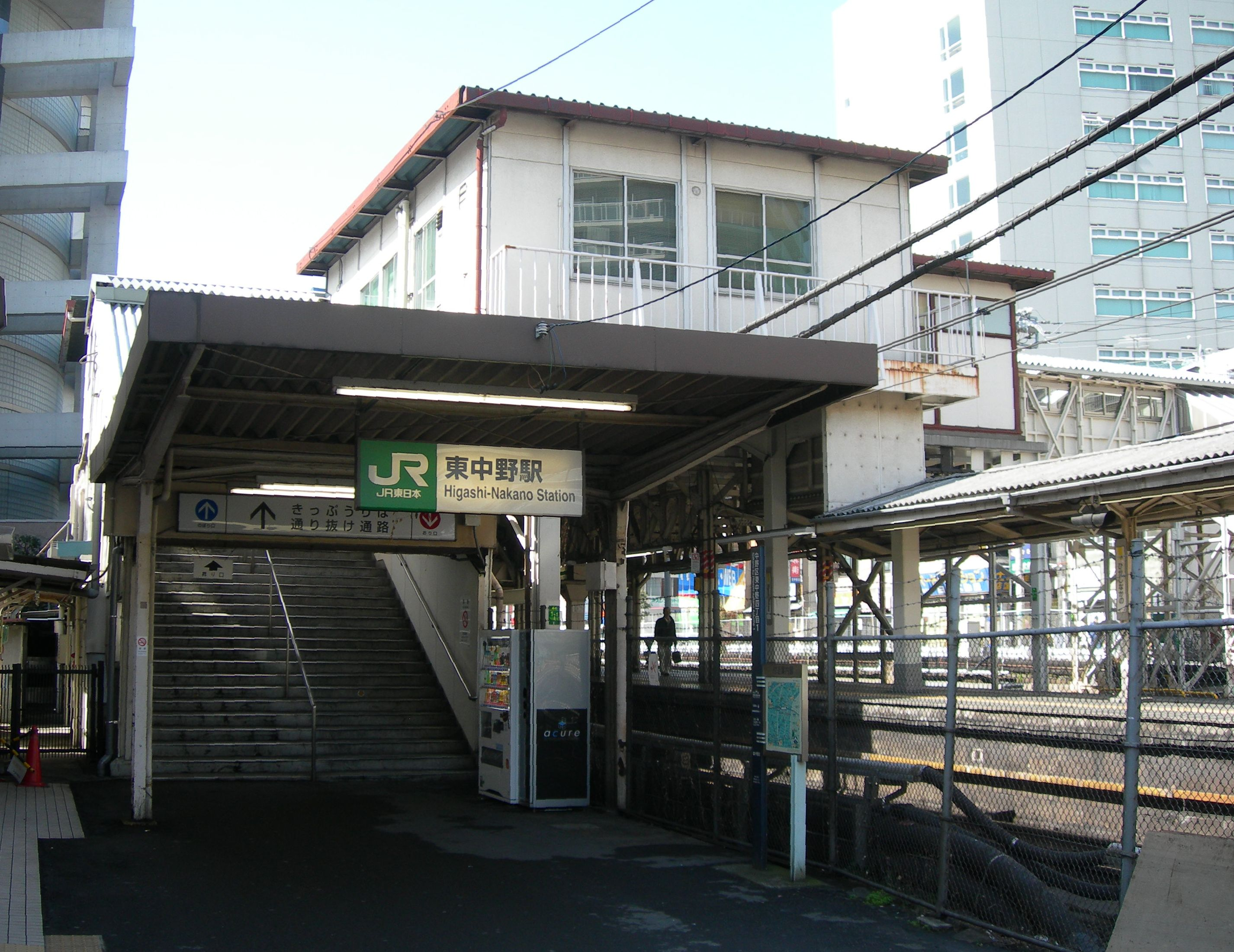 東中野駅東口